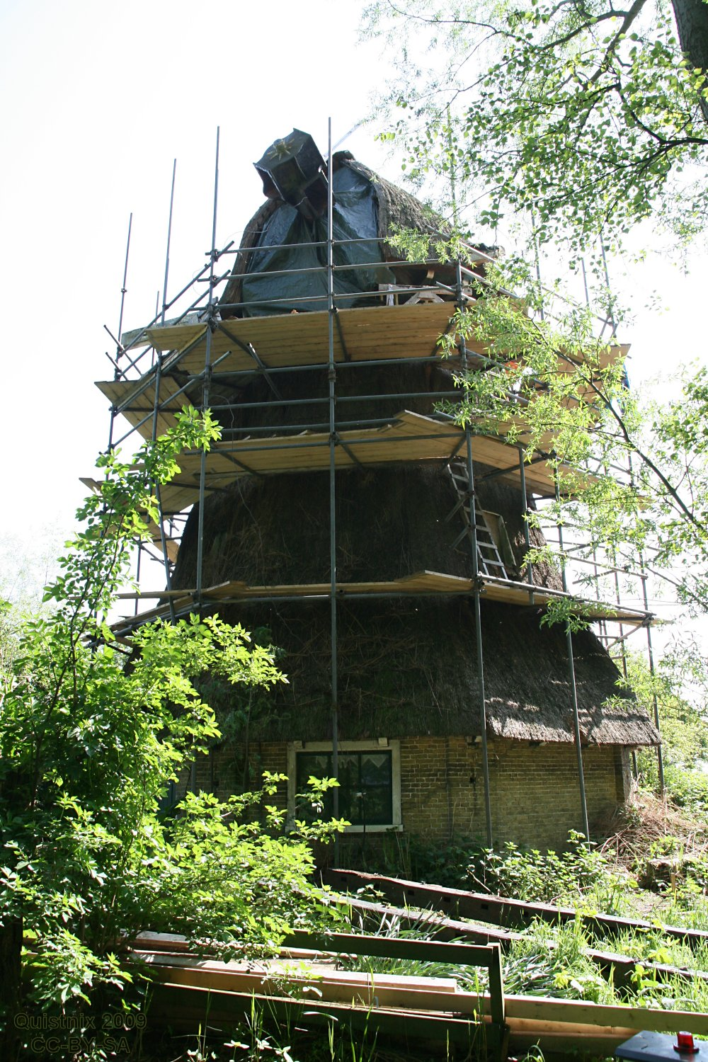 Nijetrijne: Molen De Rietvink in de steigers